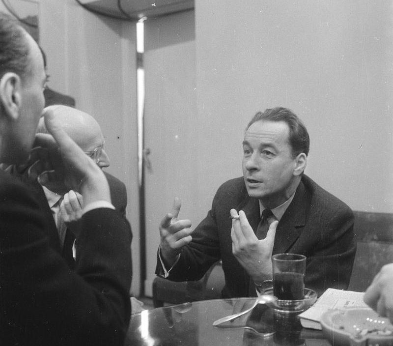 7th Chopin Competition - conductor Witold Rowicki